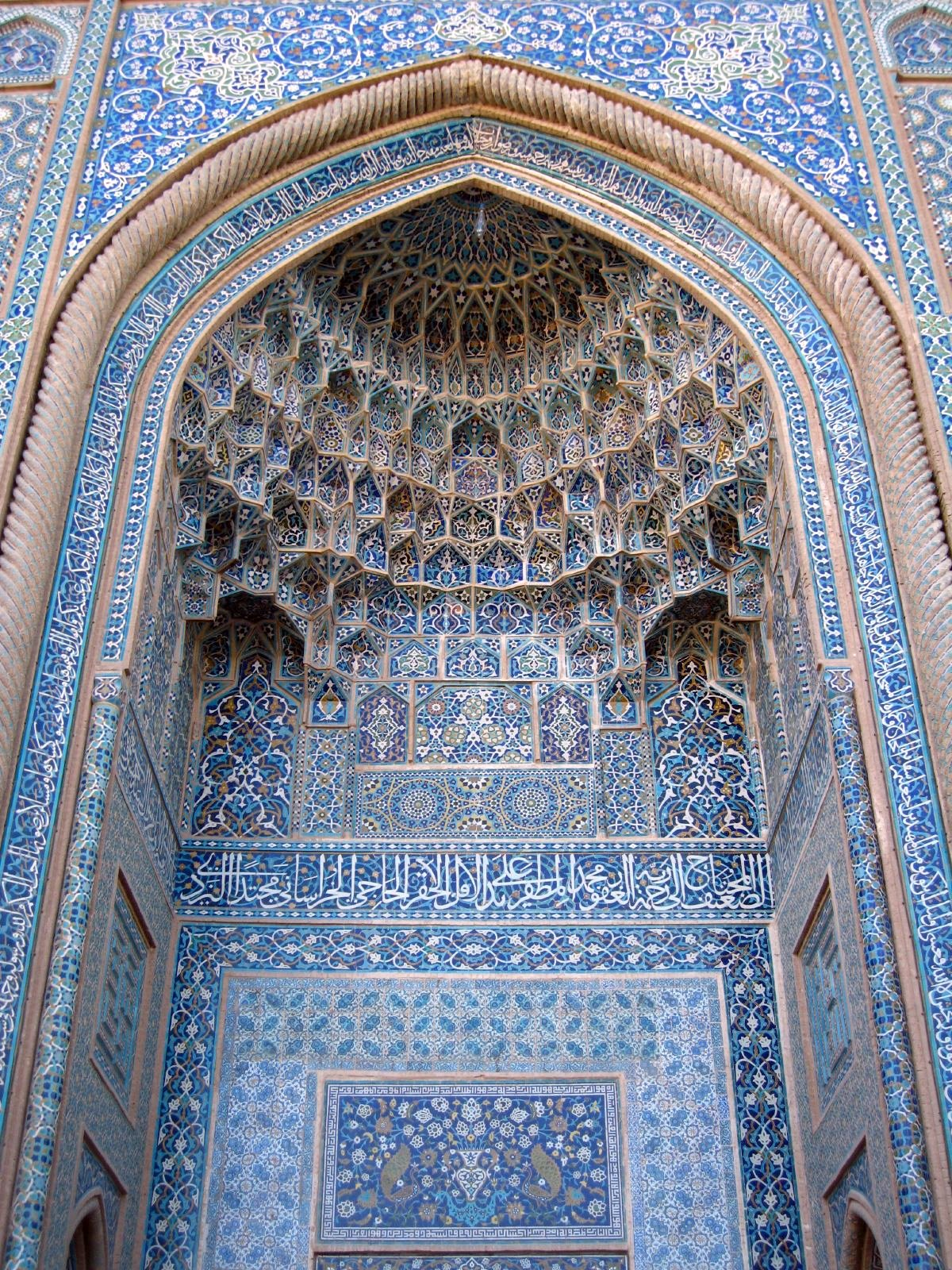 Jameh Mosque, Kerman, Iran